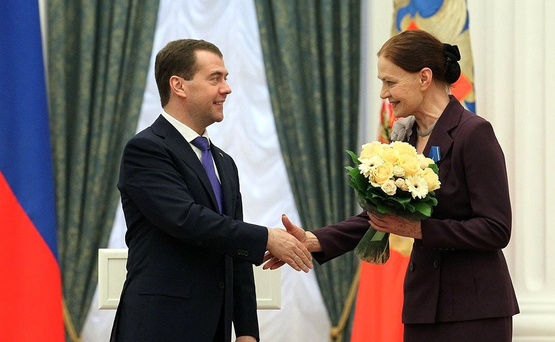 Дмитрий Медведев на церемонии вручения государственных наград. Орденом Почёта награждена артистка Центрального академического театра Российской Армии Людмила Чурсина